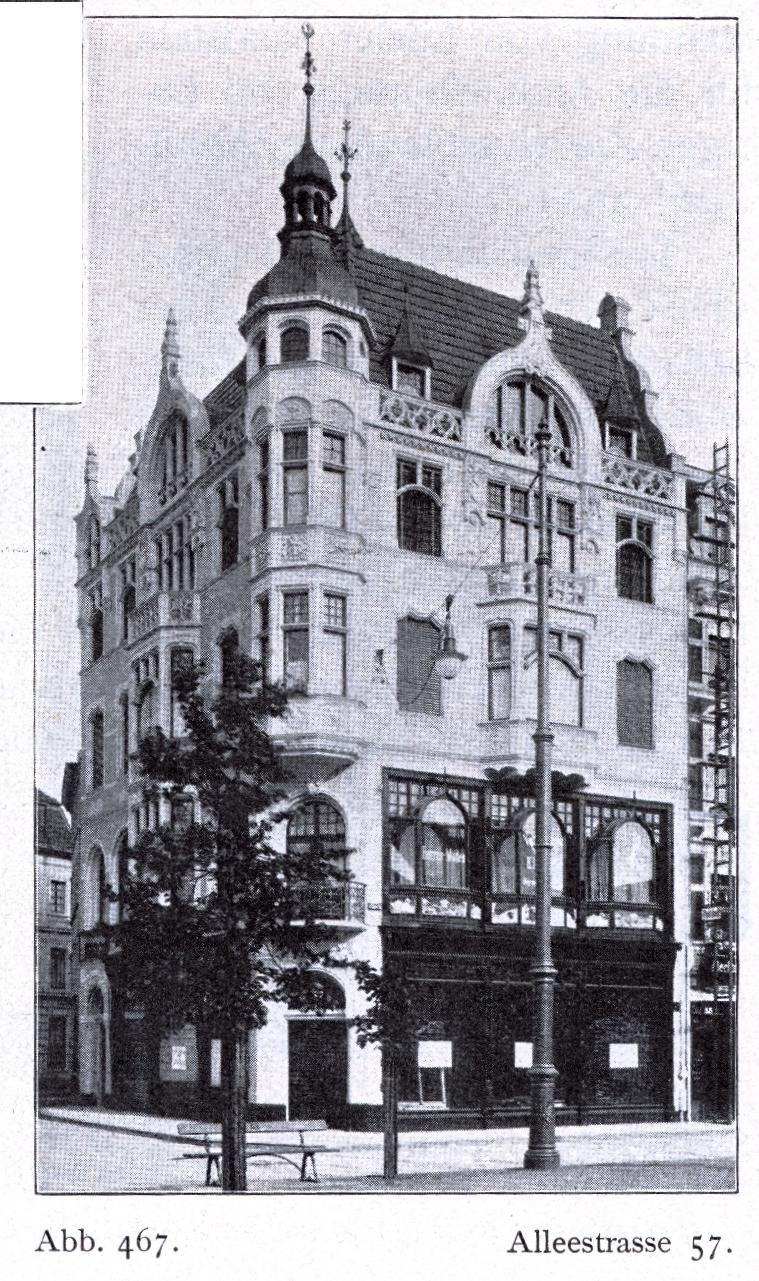 Kymly’sches Geschäftshaus an der Alleestraße 57(heute: Heinrich-Heine-Allee), Ecke Stadtbrückchen in Düsseldorf, erbaut vor 1904, Architekt Leo von Abbema, Bauherr Kymly.jpg